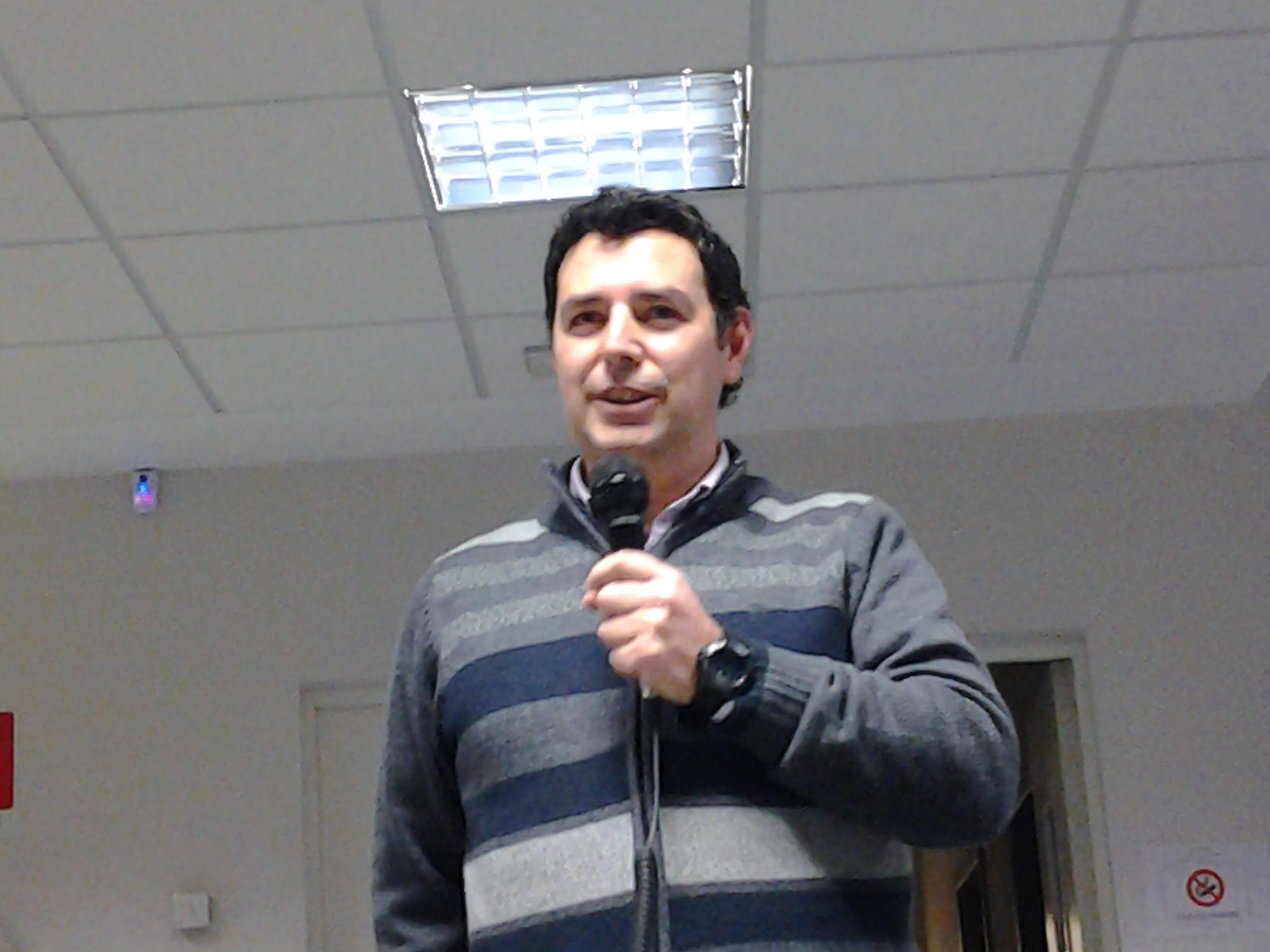 Marco Scibona